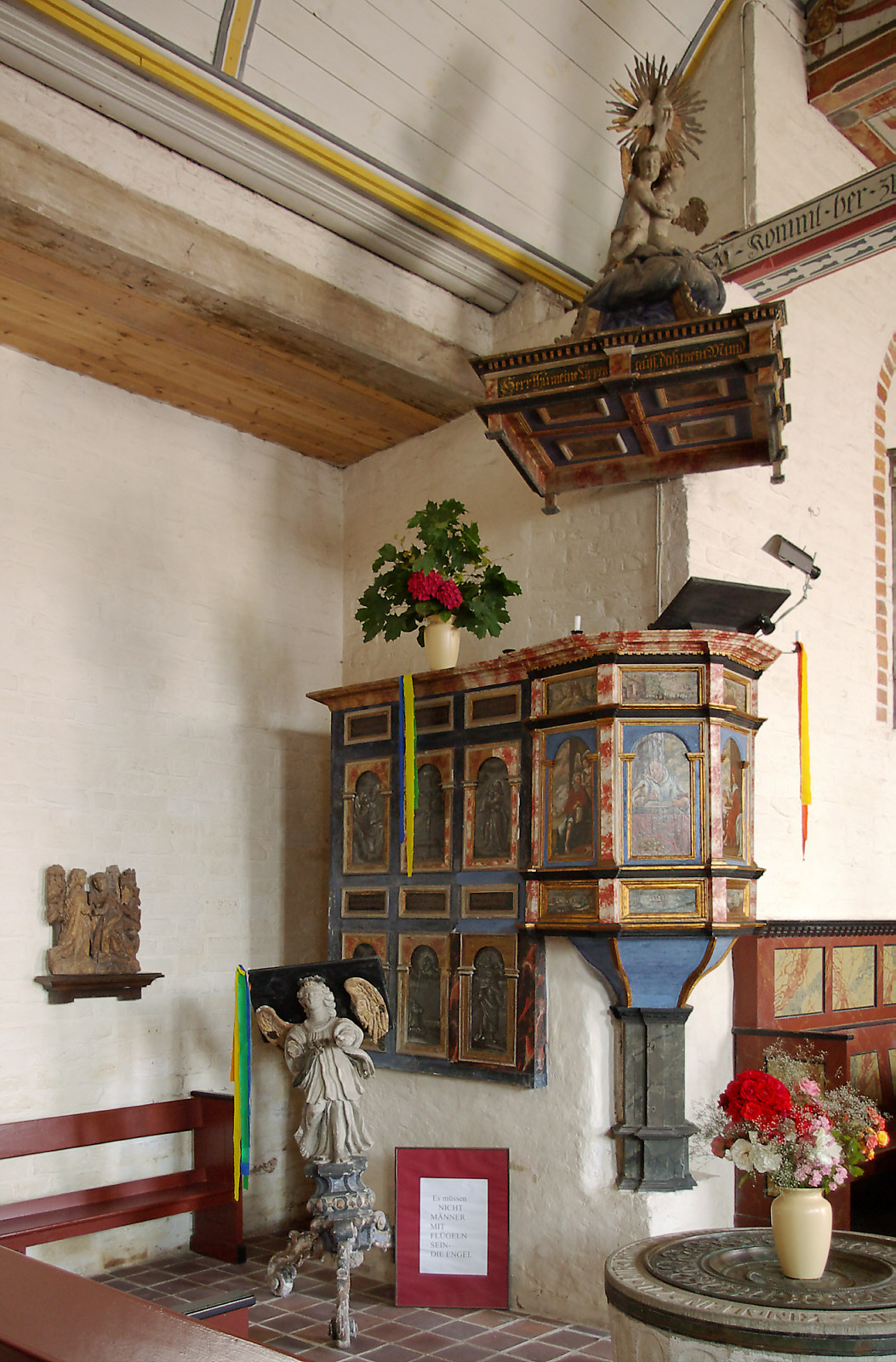 St. Nikolai-Kirche Altefähr, Rügen. Blick auf die Kanzel